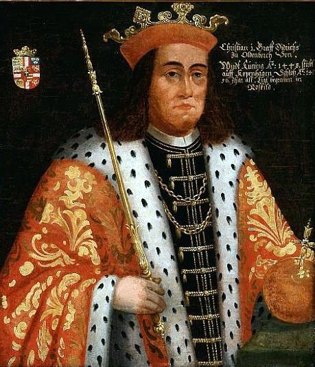 Portrait du Roi Christian I du Danemark